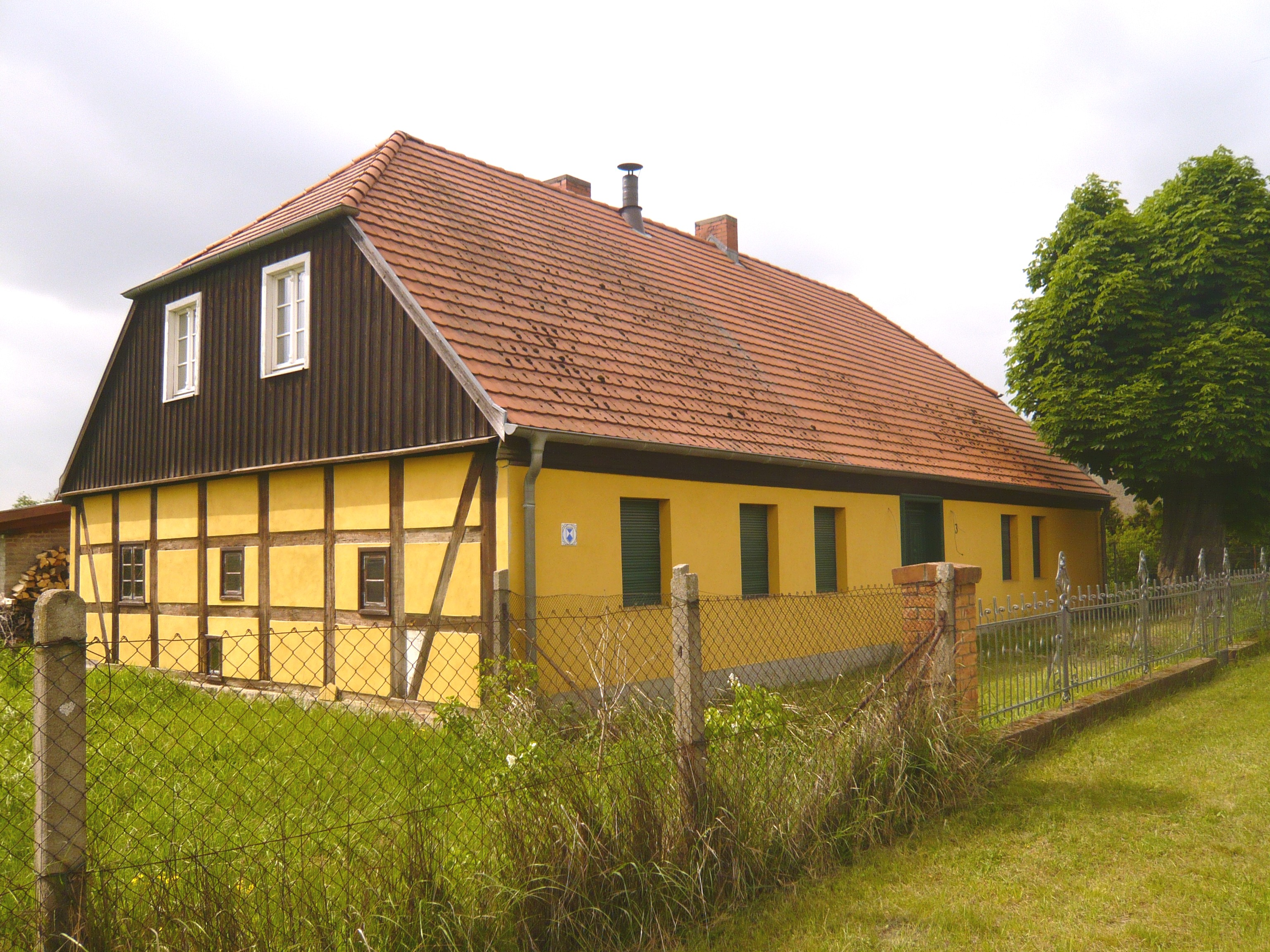 Gemeinde Wandlitz, Ortsteil Klosterfelde, Baudenkmal Hauptstraße 5